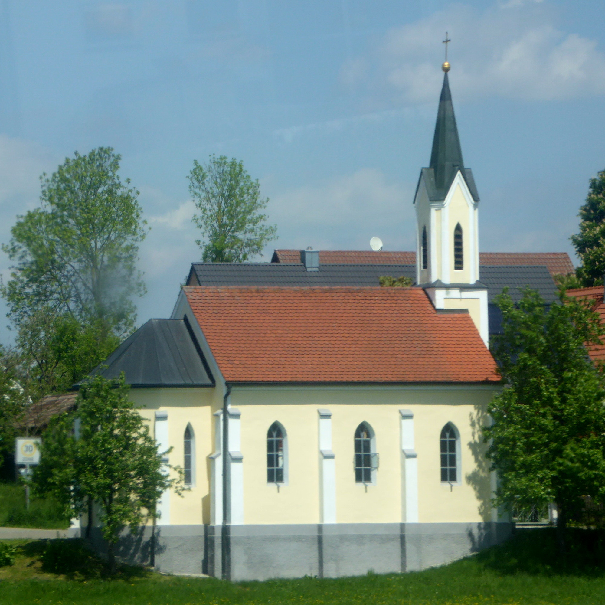 Die Südseite der Kirche Sankt-Ulrich in Stumpfenbach (Markt Altomünster).